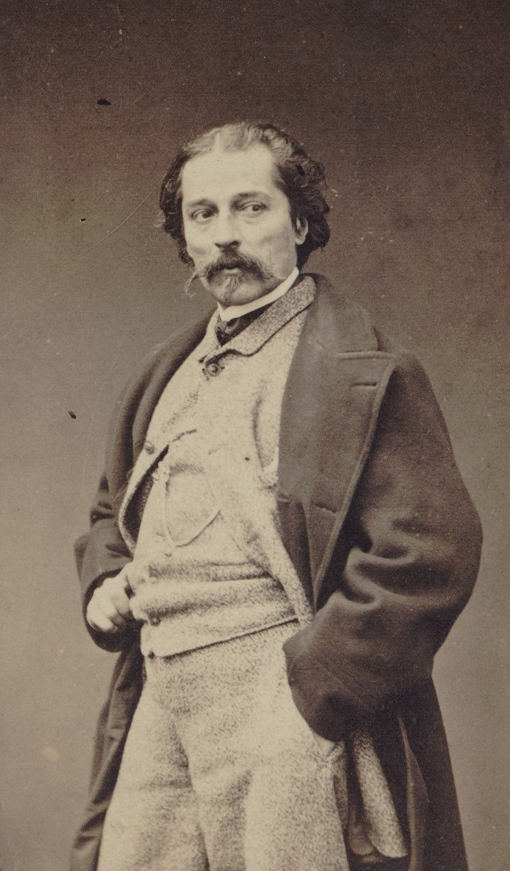 Photographie d'Aimé Millet par Pierre Petit en 1865